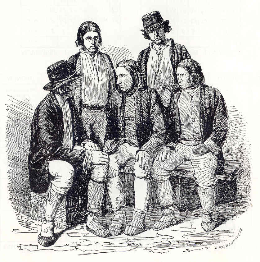 Klagomännen från Ormsö 1861, tecknad av C. Weidenhavn, blev en spridd bild för den rikssvenska allmänheten av estlandssvenskarna.